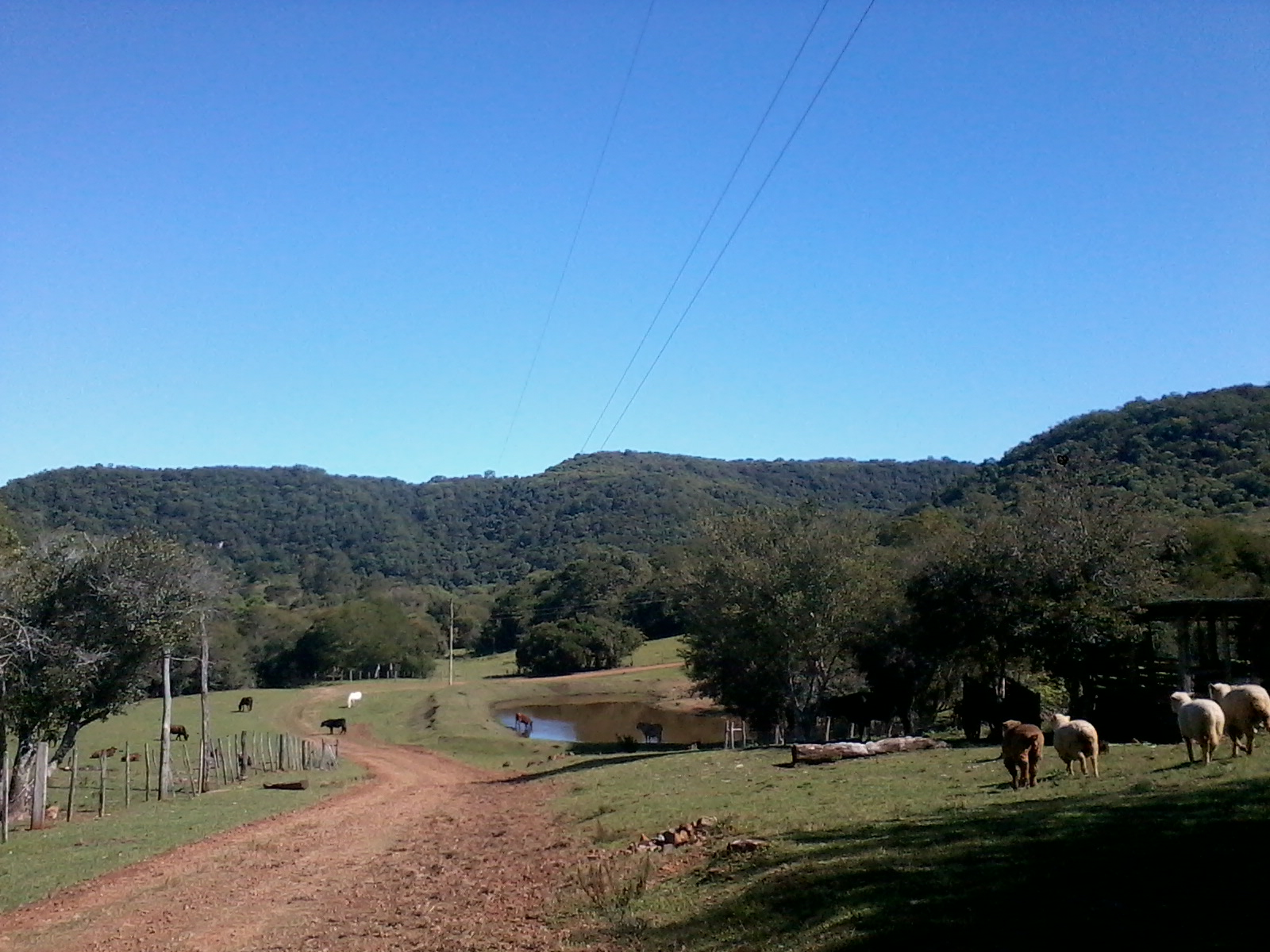 Paisagem comum no Rincão Lambert.